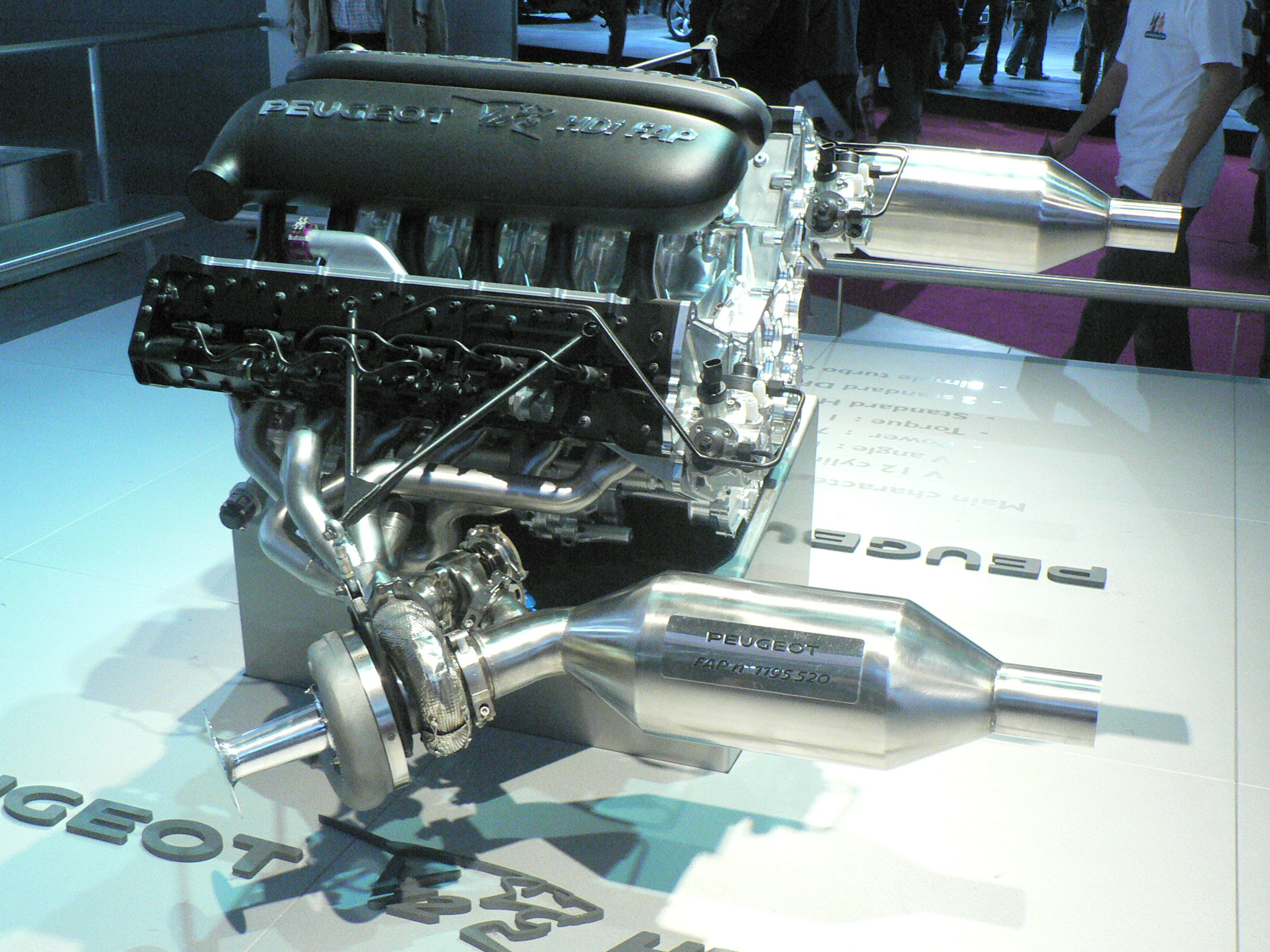 Mondial de l'automobile, Paris 2006